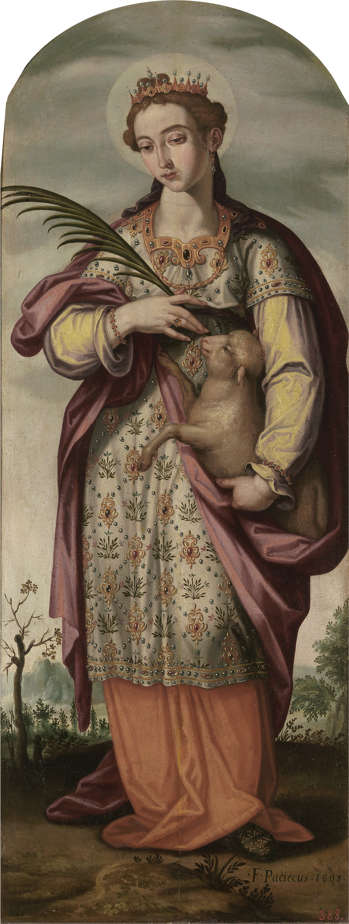 La obra representa a la virgen y mártir Santa Inés de Roma, y es una de las cuatro obras de Francisco Pacheco que se conservan en el Museo del Prado.